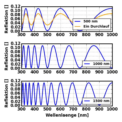 Intensitätsmuster von Dünnfilmen mit unterschiedlichen Dicken.